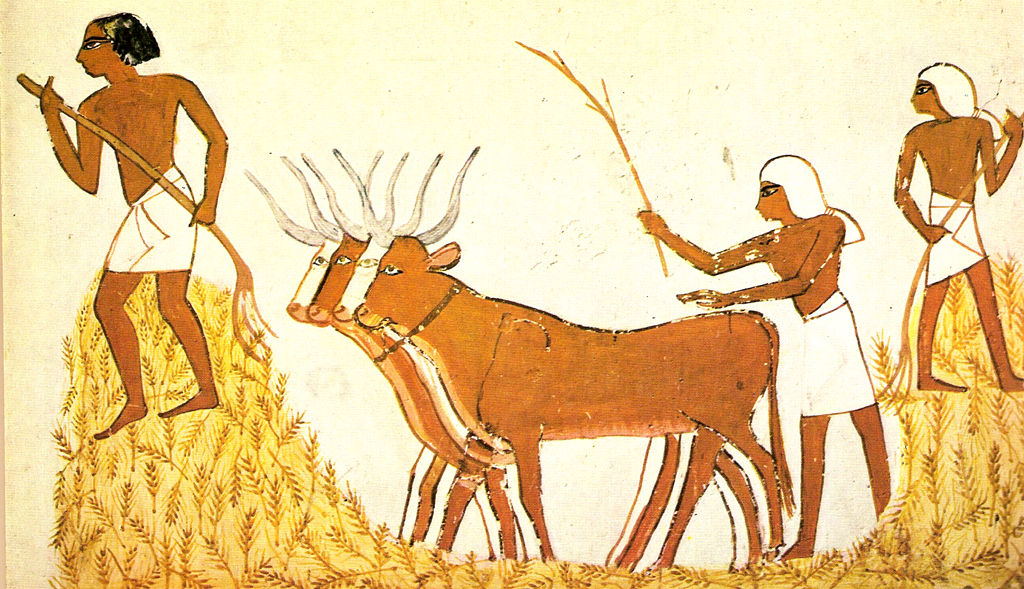 Pintura del Antiguo Egipto mostrando la trilla del trigo